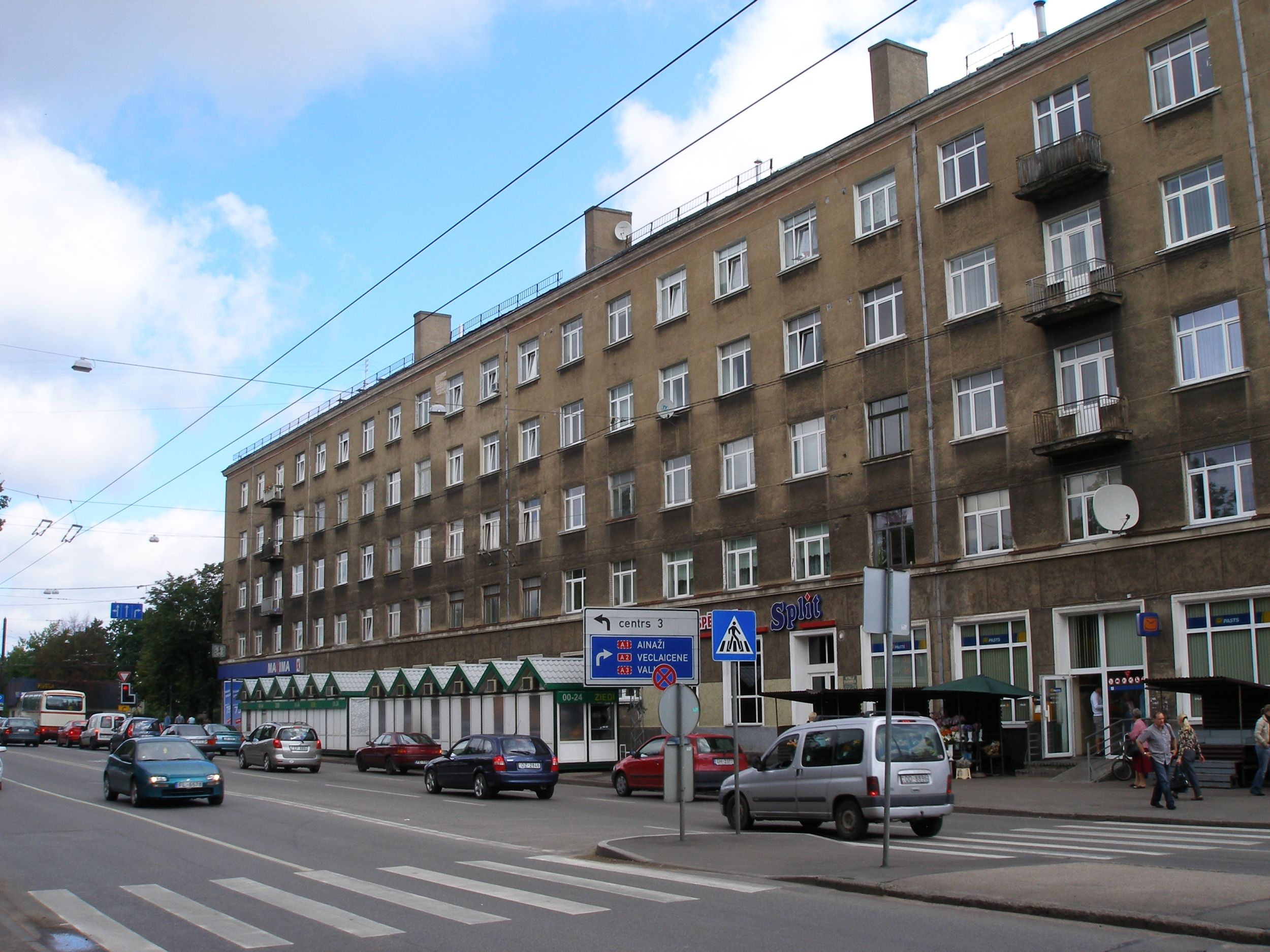 Puķu tirdziņš pie Maksimas Brīvības gatvē 310